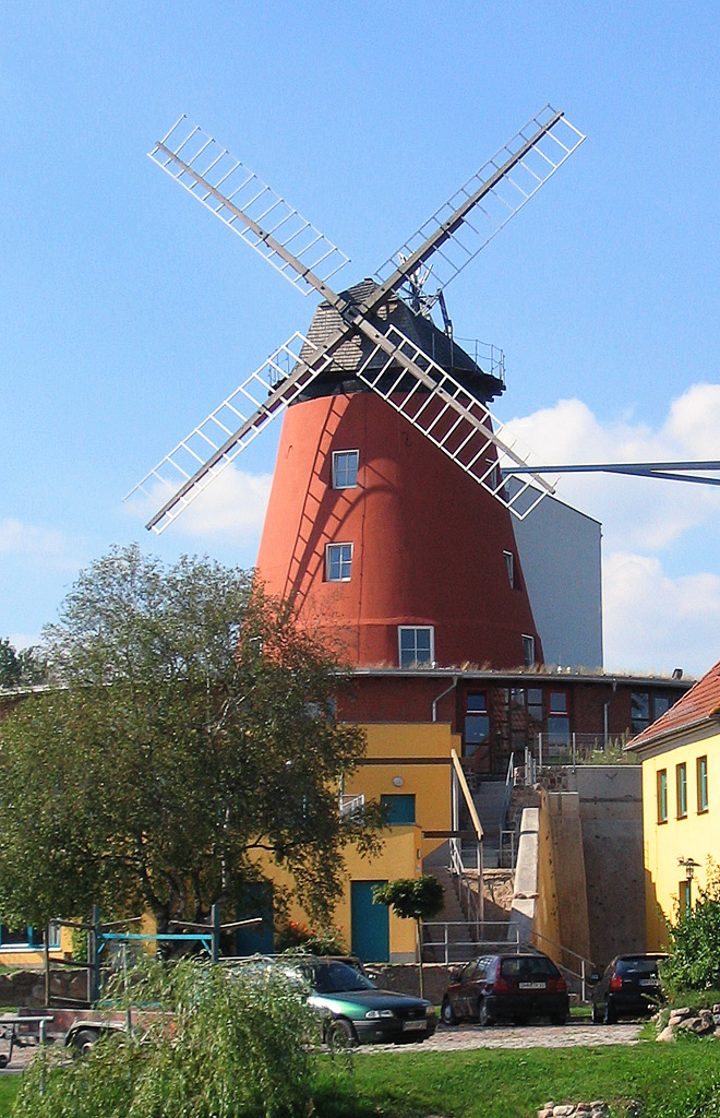 Beschreibung: Mühle am Mühlenberg - heute eine Gaststätte Fotograf: Darkone, 2. September 2004